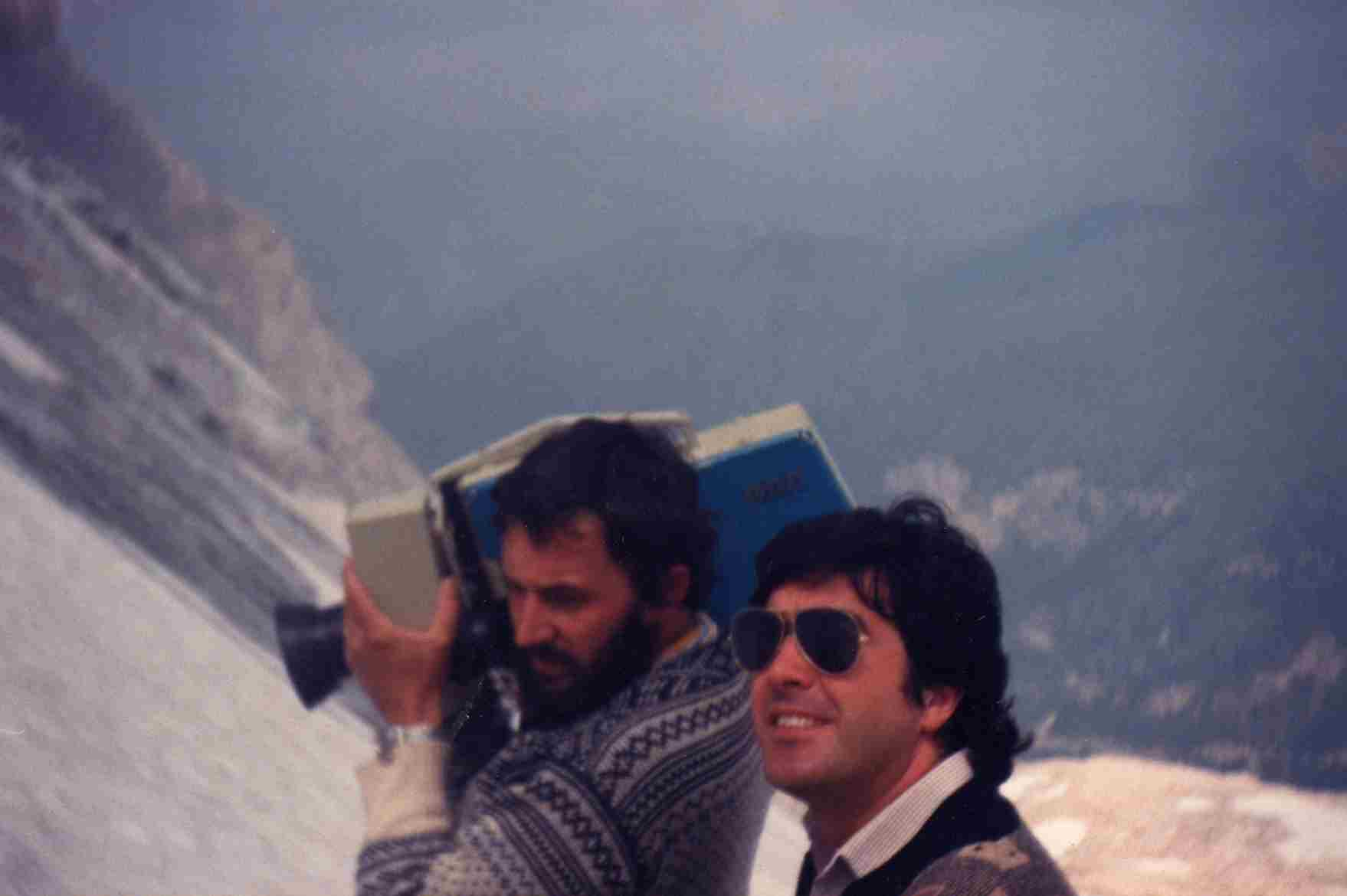 Alberto Tafner